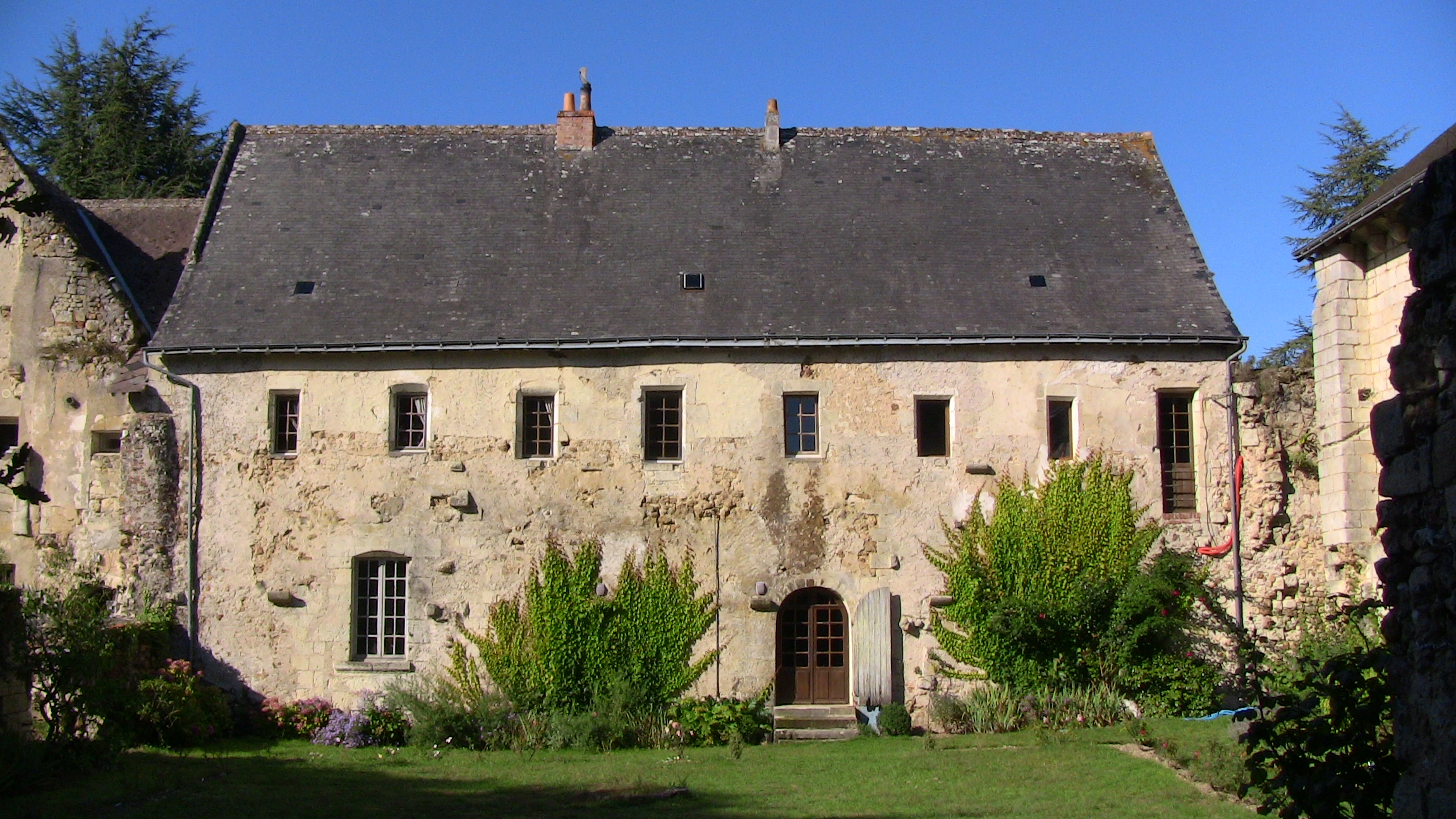 Prieuré Notre-Dame de Relay .